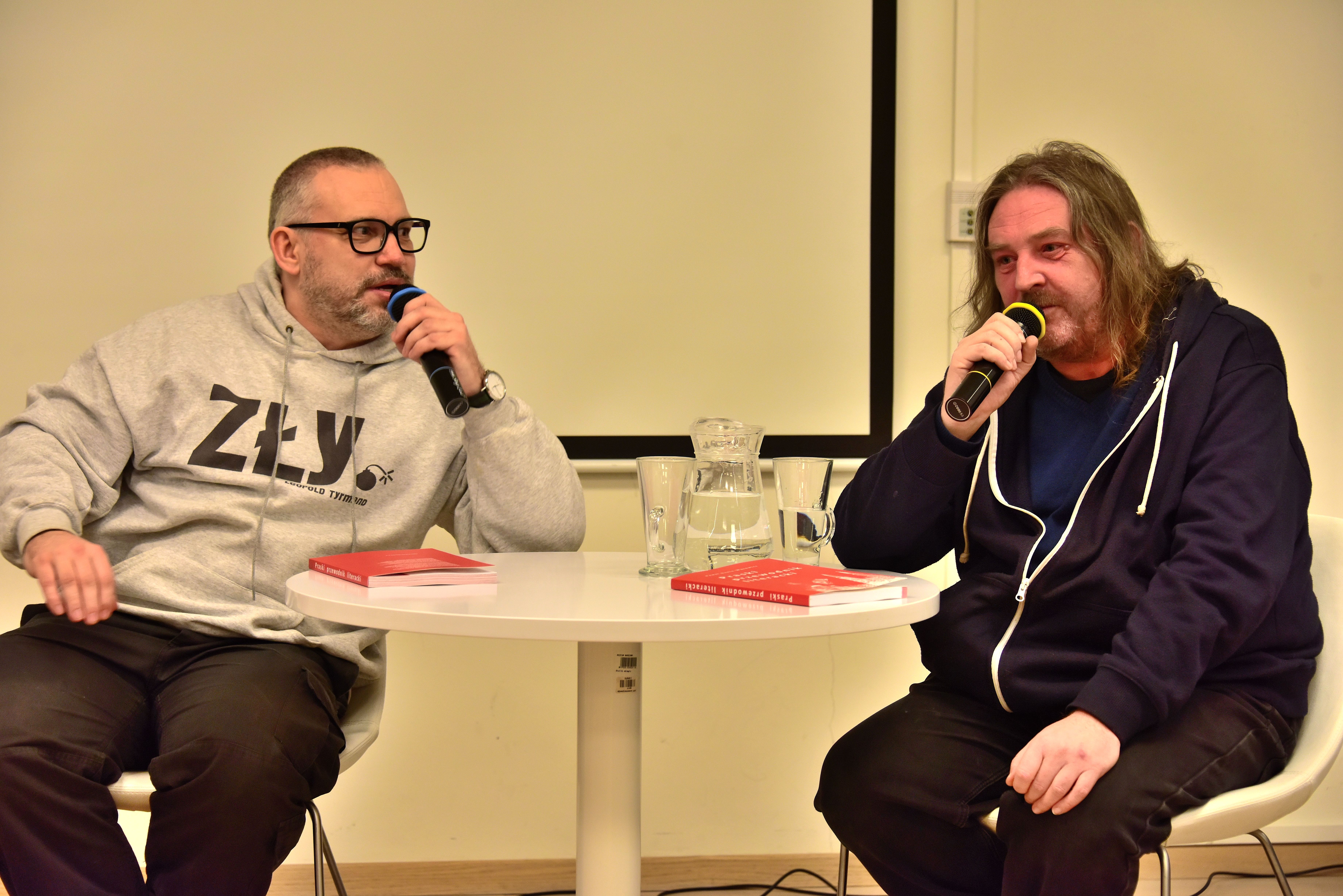 Mariusz Czubaj i Paweł Dunin-Wąsowicz podczas spotkania promującego „Praski przewodnik literacki” Pawła Dunina-Wąsowicza w Muzeum Warszawskiej Pragi